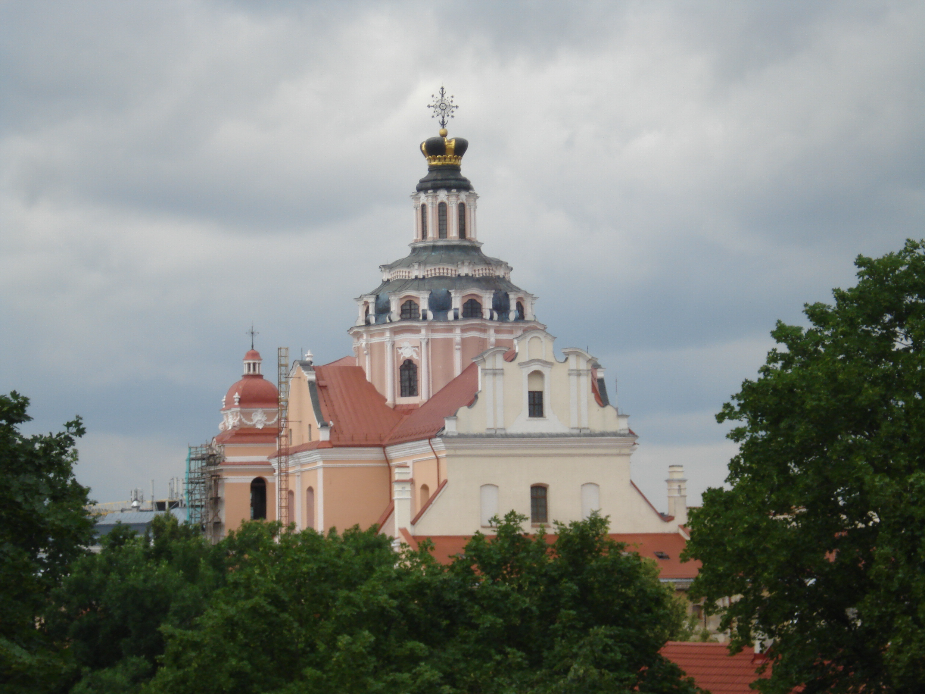 Church of St. Casimir (Šv. Kazimiero bažnyčia) in Vilnius (Didžioji g. 34)